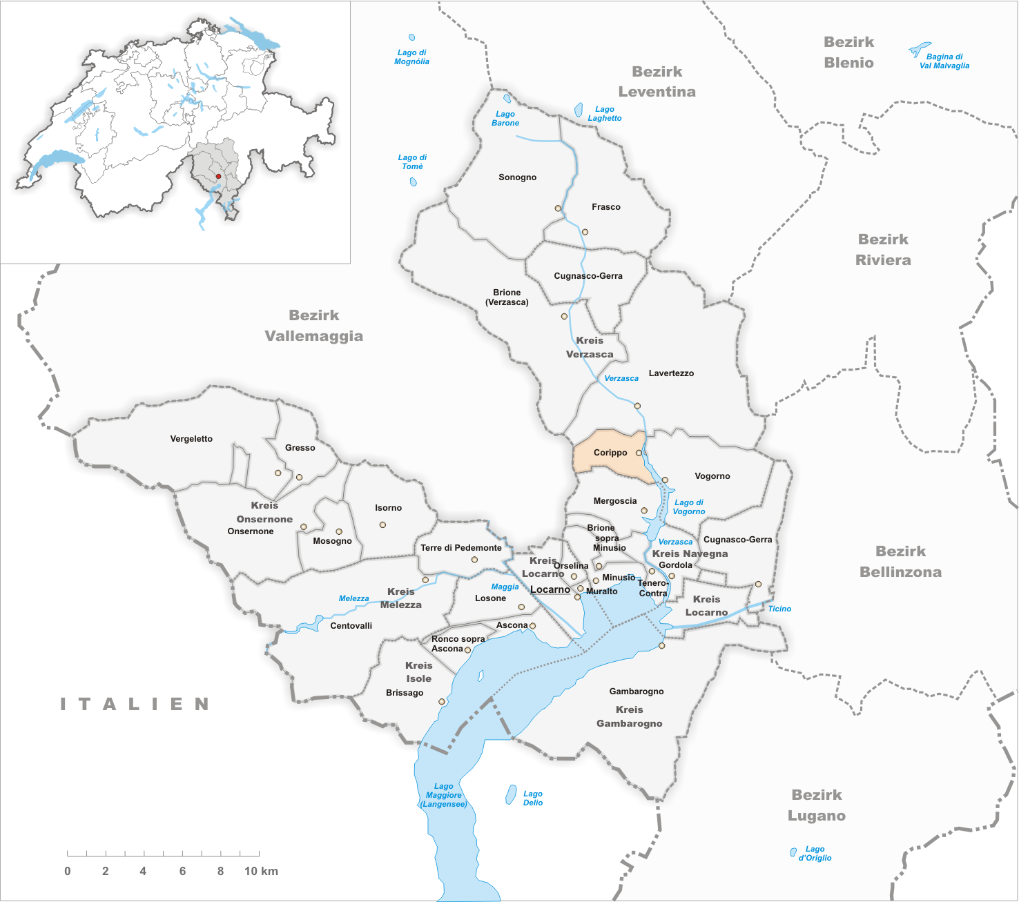 Municipality Corippo